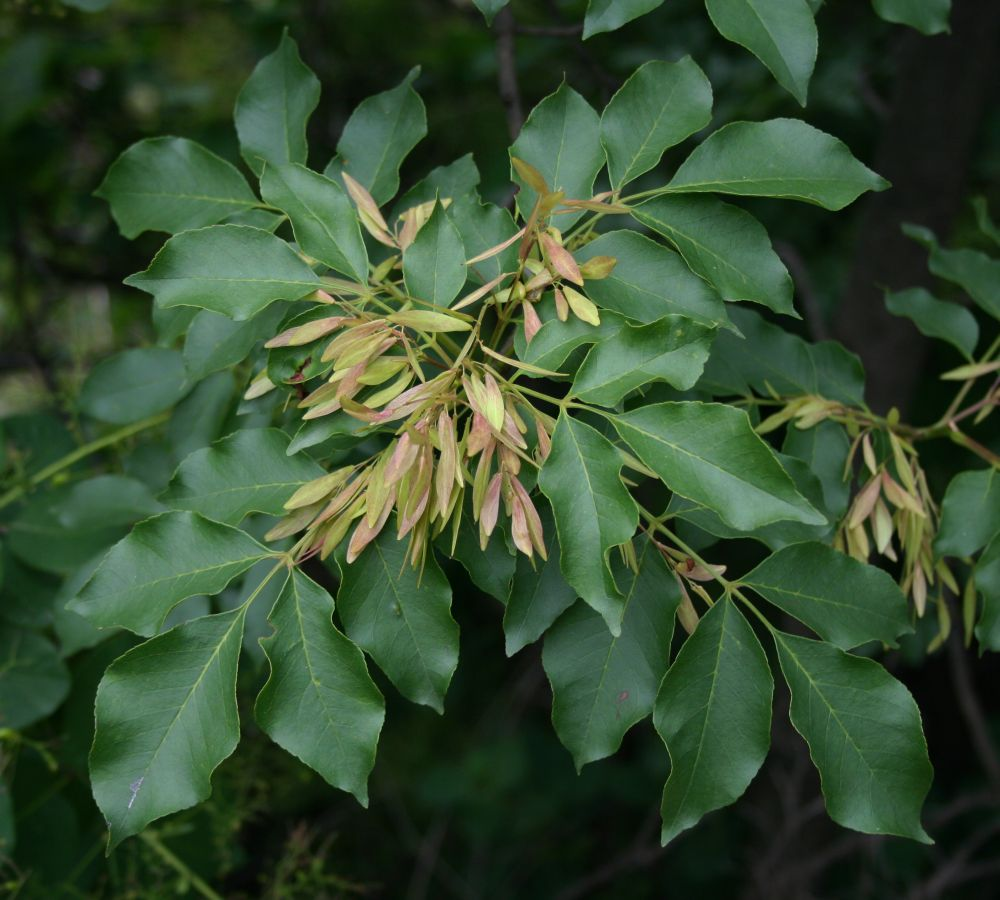 Fraxinus ornus, Ölbaumgewächse (Oleaceae) - Italien/Italia/Italy: Friuli-Venezia Giulia, Prov. Trieste, Rilkeweg/Sentiero Rilke von Sistiana nach Duino